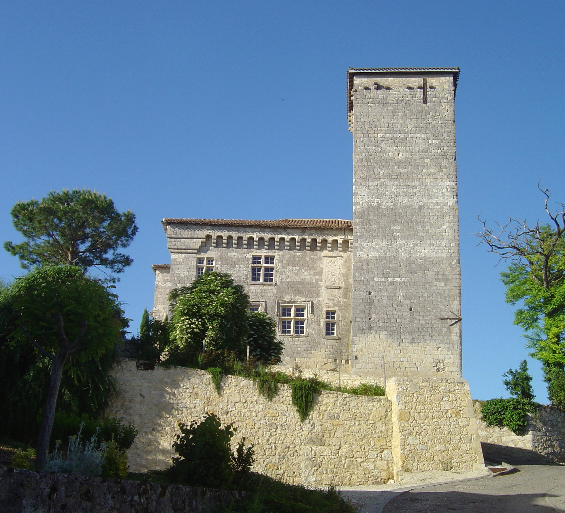 Château de Plieux (XIVe-XVIe s.), près de Lectoure, en Lomagne, Gers, Gascogne, Midi-Pyrénées .